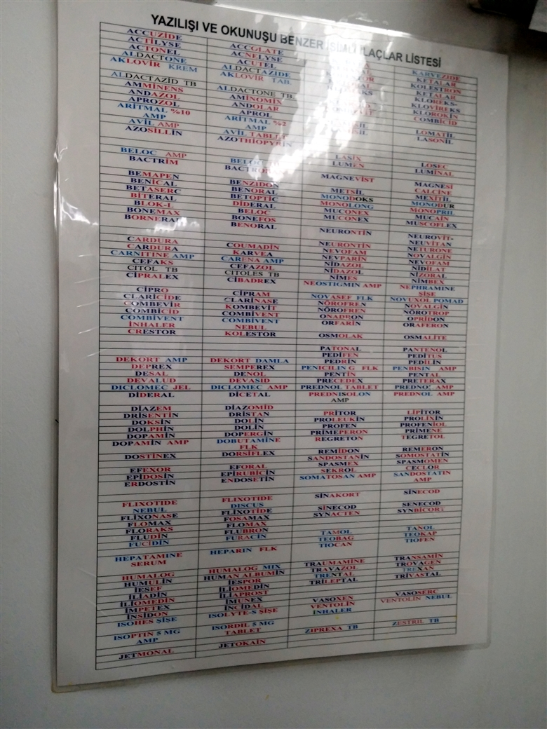 Bir hastanede asılmış, okunuşu veya yazılışı birbirine yakın ilçların listesini içeren levha.